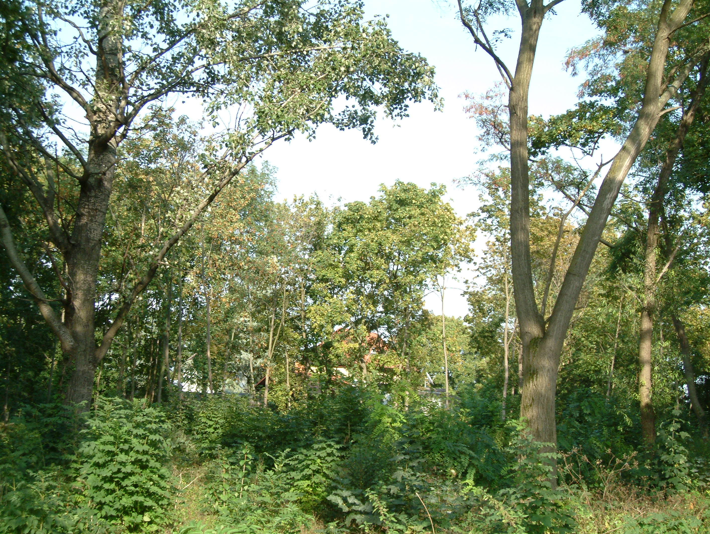 Sturmfederscher Kellergarten zu Dirmstein, selbst fotografiert am 10.09.2006 und freigegeben durch Benutzer:Mundartpoet